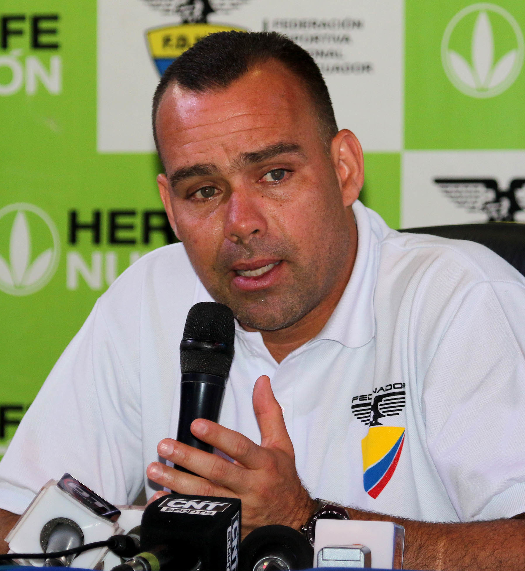 Guayaquil, jueves 27 de julio del 2017 (Andes).-El ex portero venezolano Rafael Dudamel es el invitado especial del torneo formativo de fútbol de Fedenador. Foto:Andes/César Muñoz